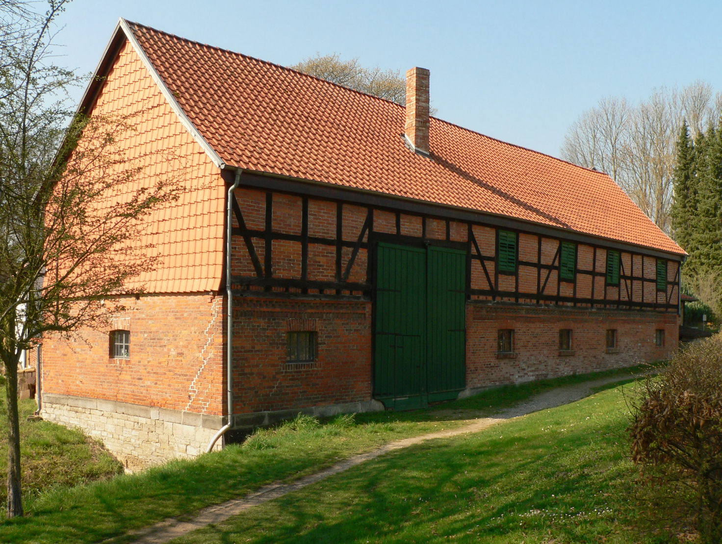 Mühlengebäude der Wassermühle Liesebach